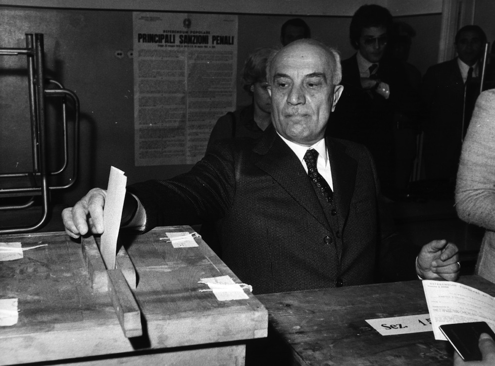 Roma, 12 maggio 1974. Amintore Fanfani, segretario della Democrazia Cristiana, vota al referendum sul divorzio.